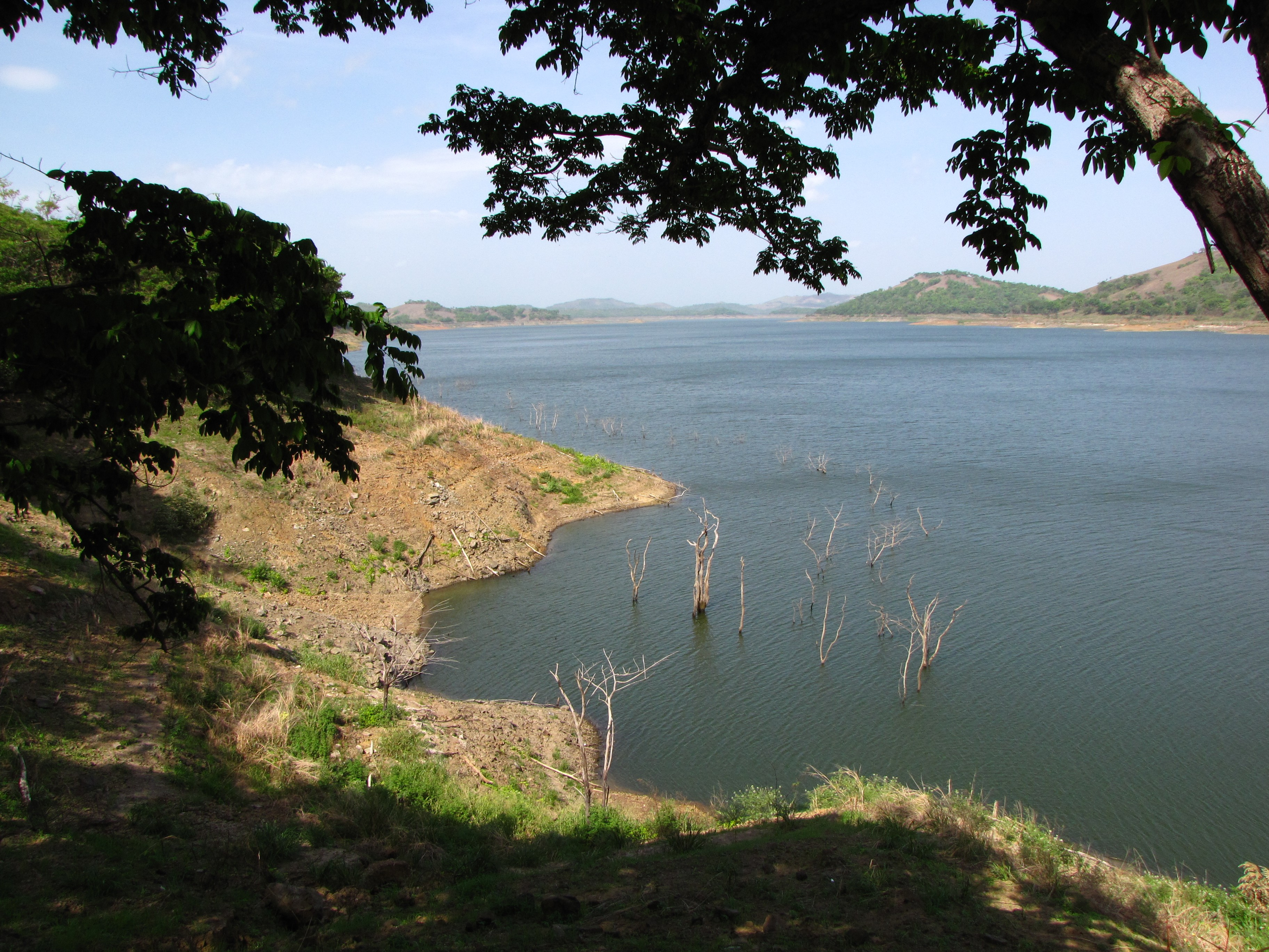 Lugar / place / lieu : Embalse de Camatagua, Estado Aragua, Venezuela.